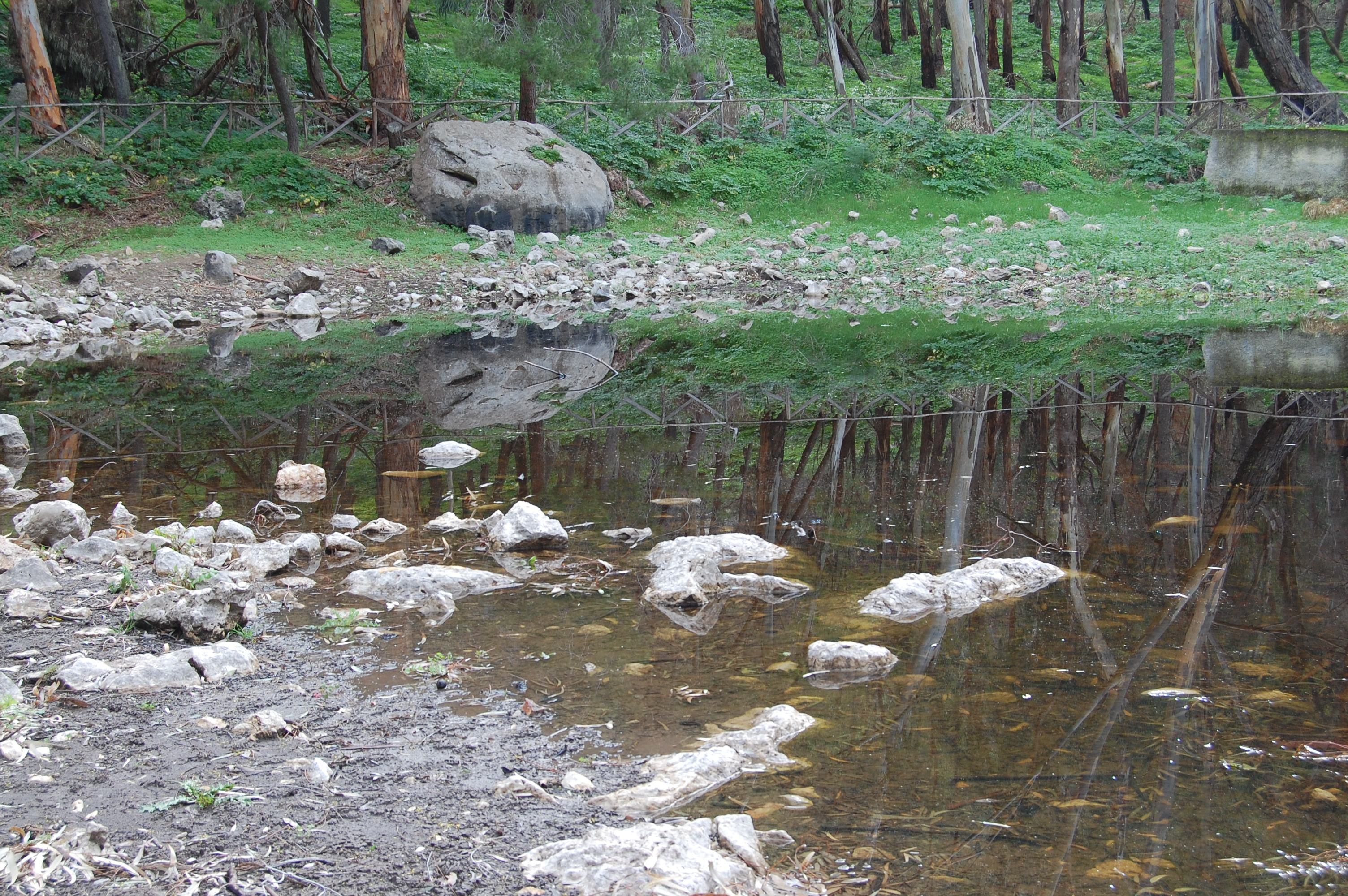 Gorgo di Santa Rosalia Riserva naturale Monte Pellegrino